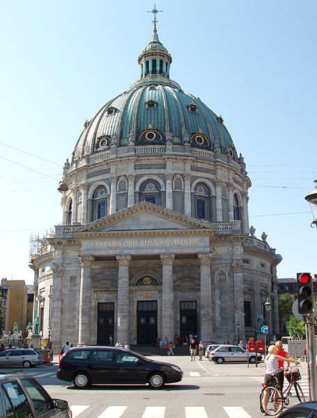 Marmorkirken København Marble-church, Copenhagen buildings